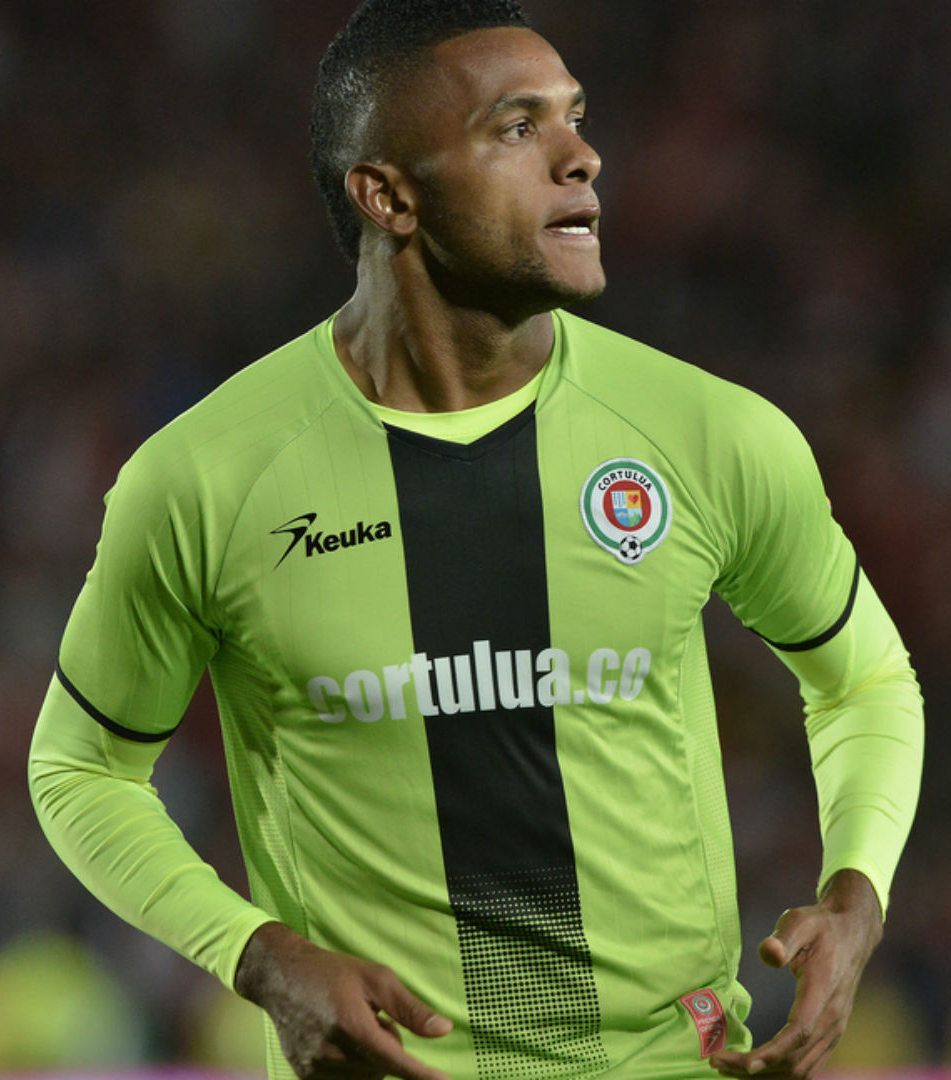 Miguel Borja